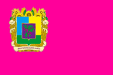 Прапор Мелітопольського району